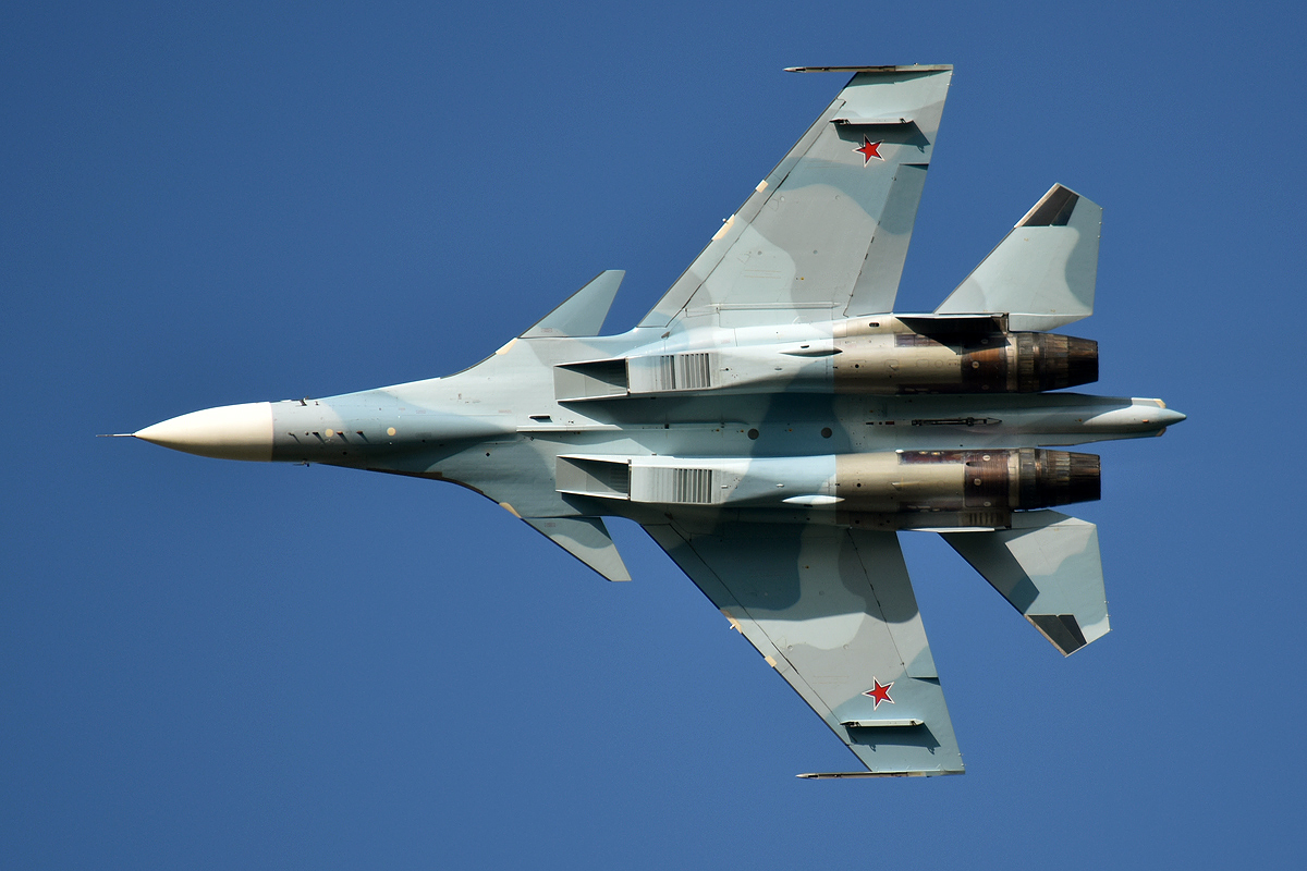 Russian Navy, RF-34013, Sukhoi Su-30SM